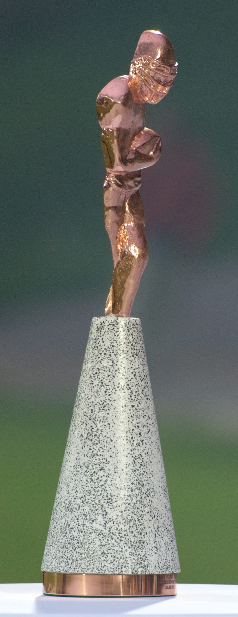 Trophäe für den Gewinner der Austrian Bowl